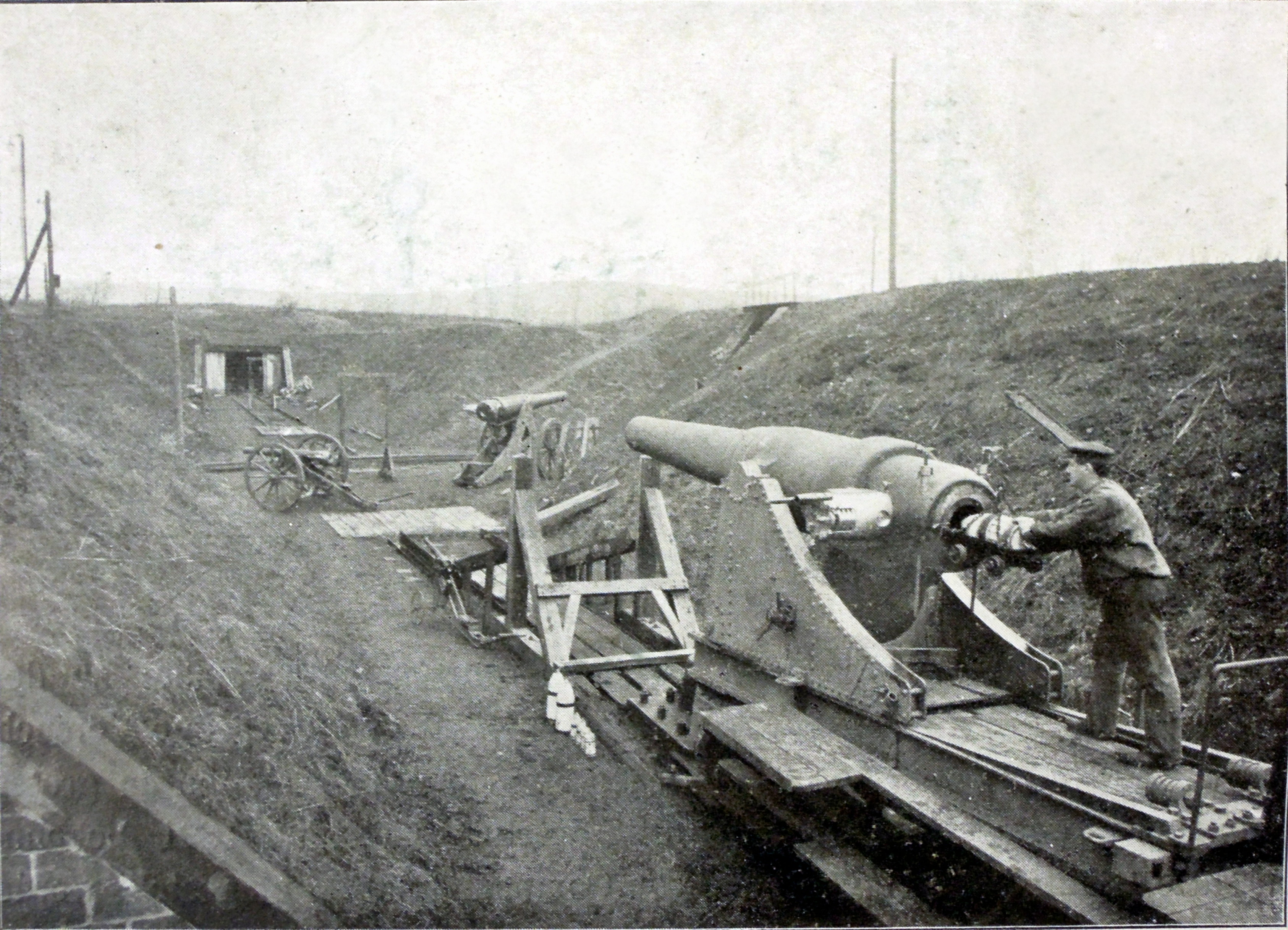 Alter Schießplatz mit 21cm Geschütz